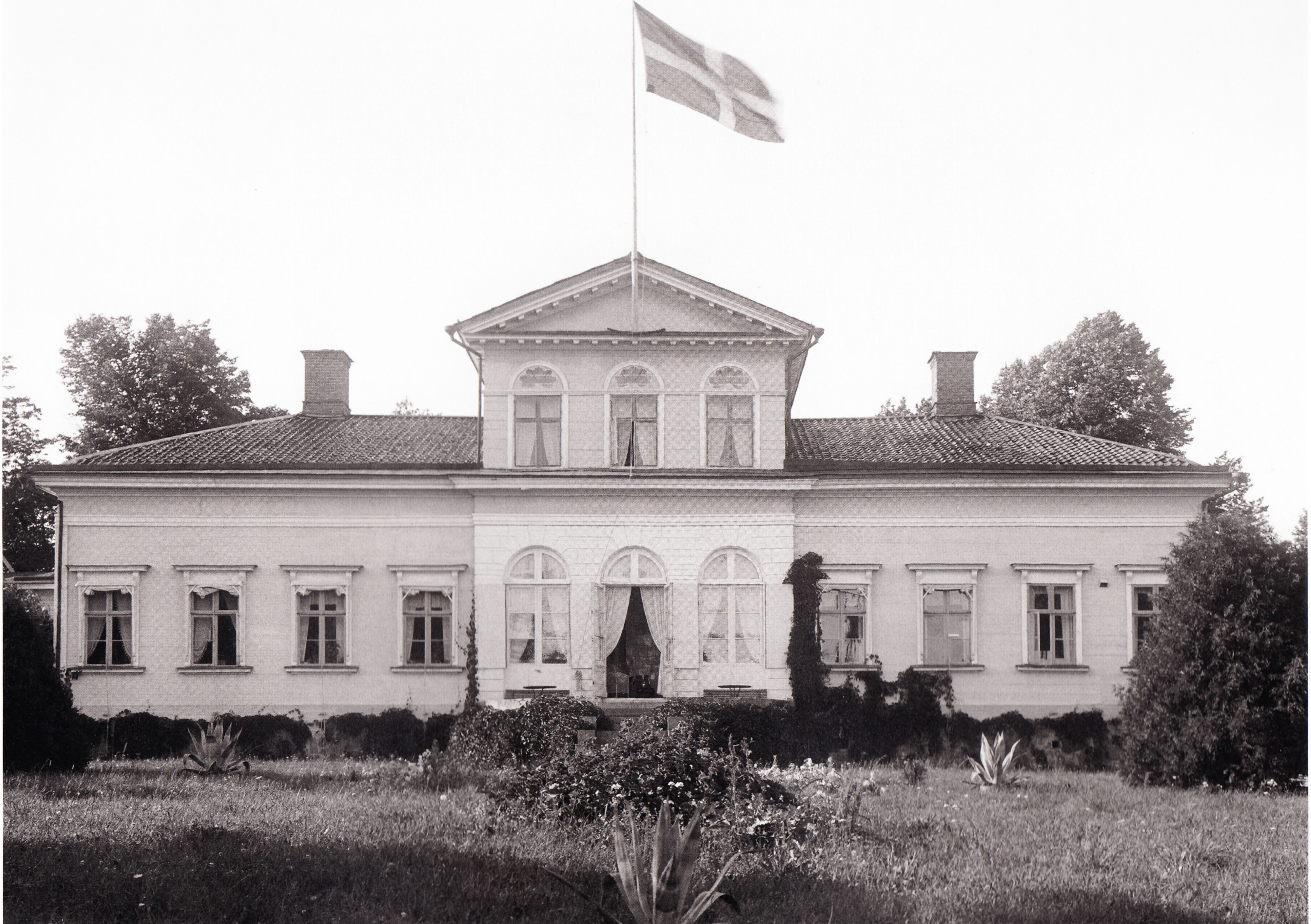 artukaisten kartano, katolla liehuu epävirallinen Suomen lippu